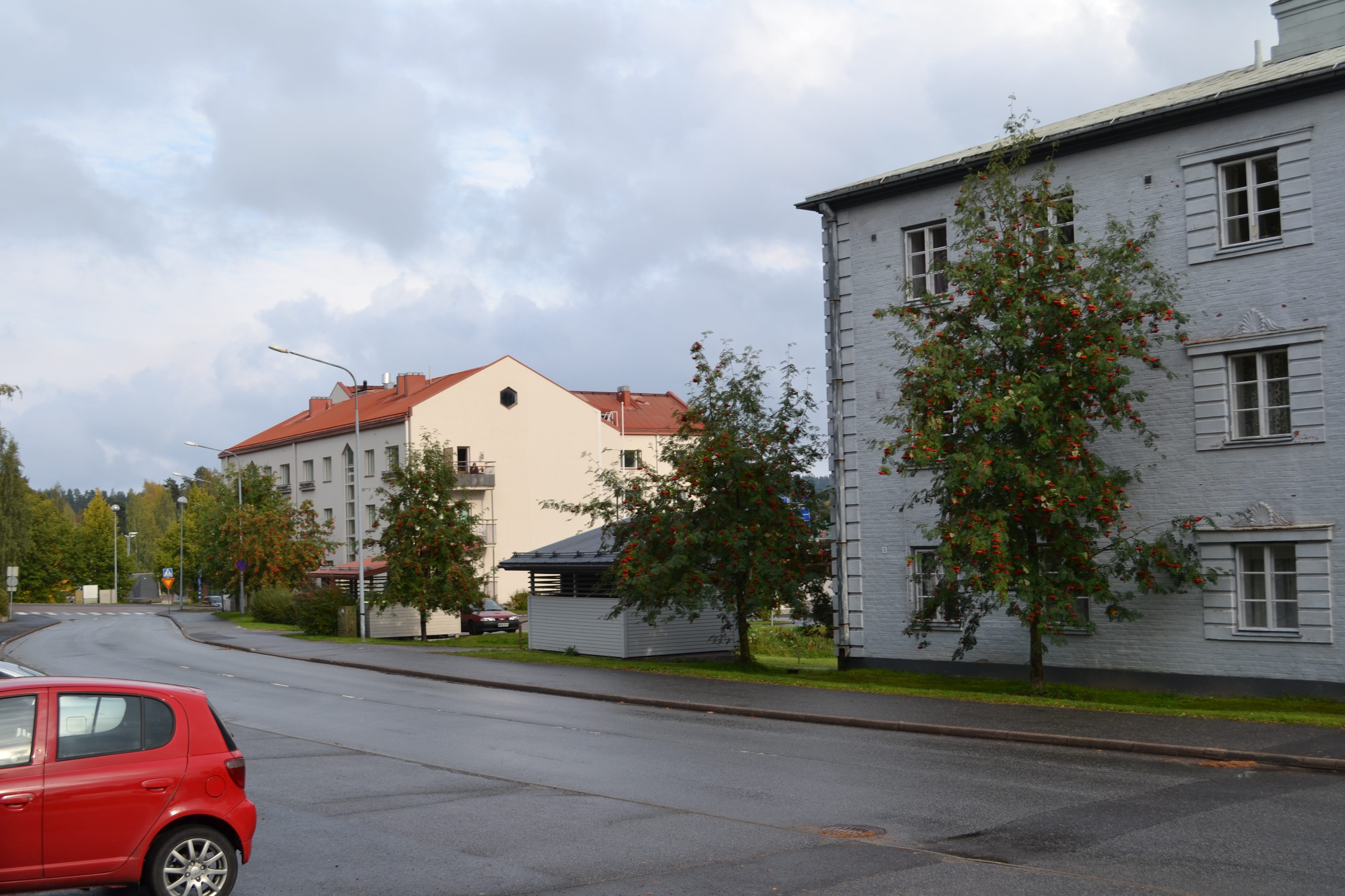 Kaksi kerrostaloa Vaajakosken Haapatiellä